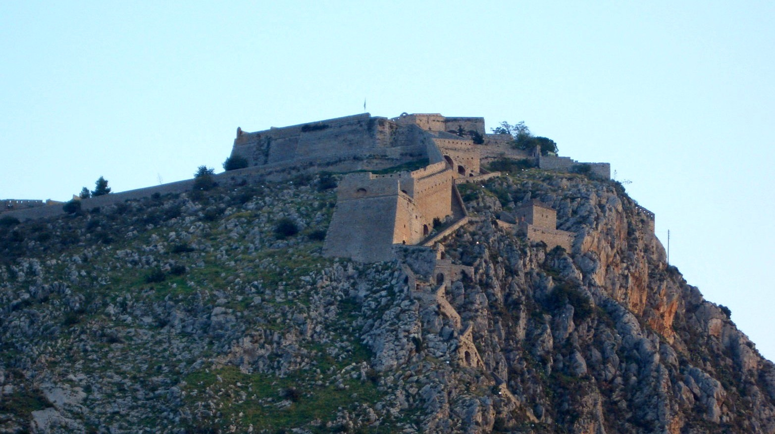 Nauplia